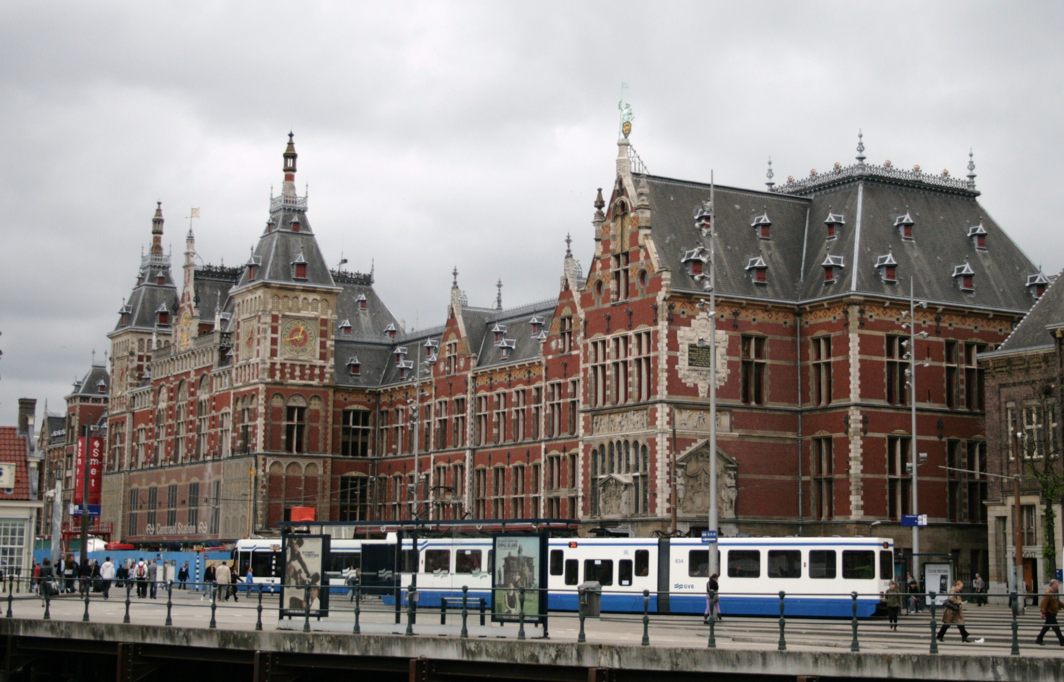 Здание центрального вокзала Амстердама